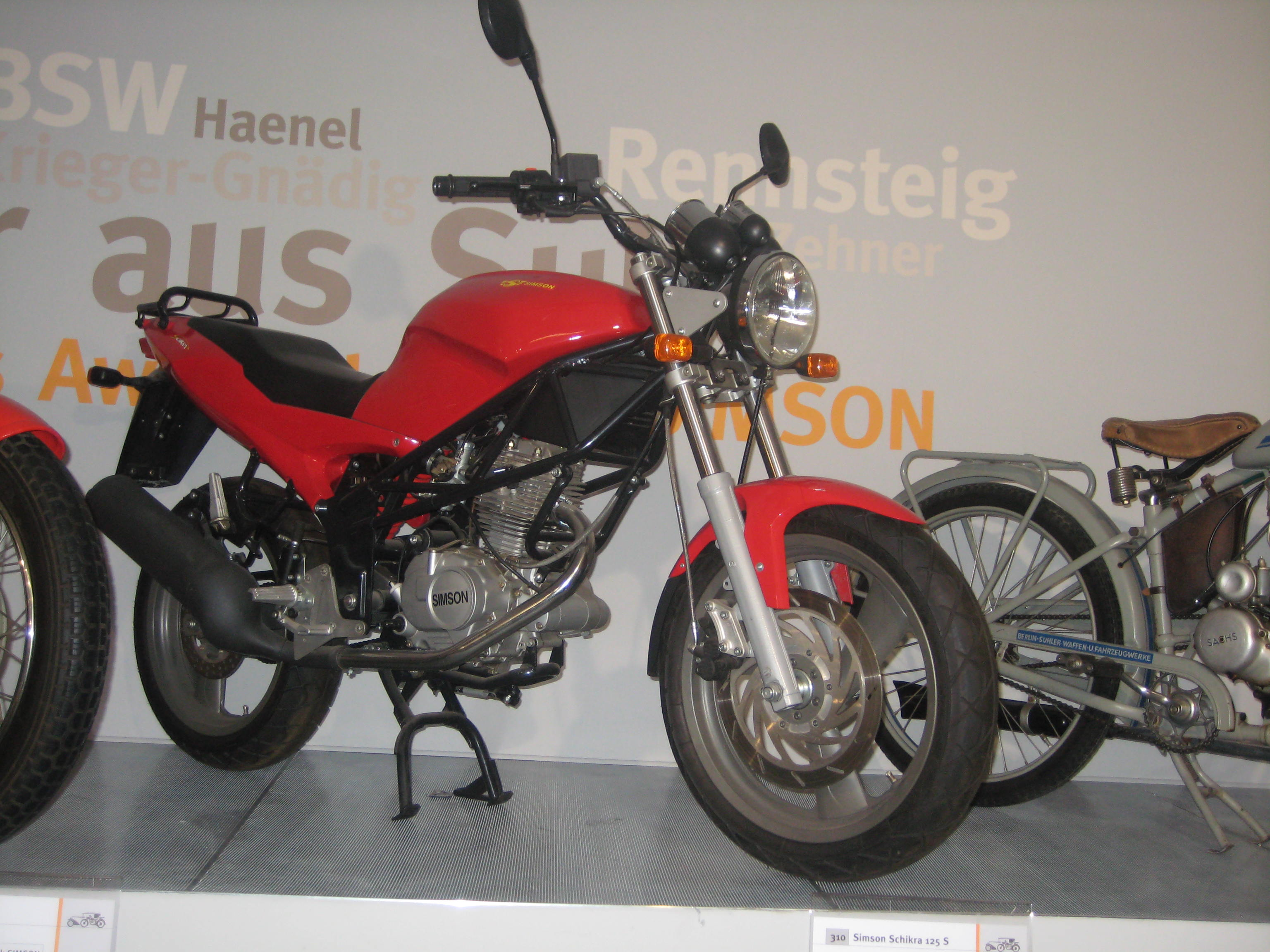 Zdjęcie przedstawiające motocykl Simson Schikra 125 będący eksponatem w Fahrzeugmuseum Suhl.